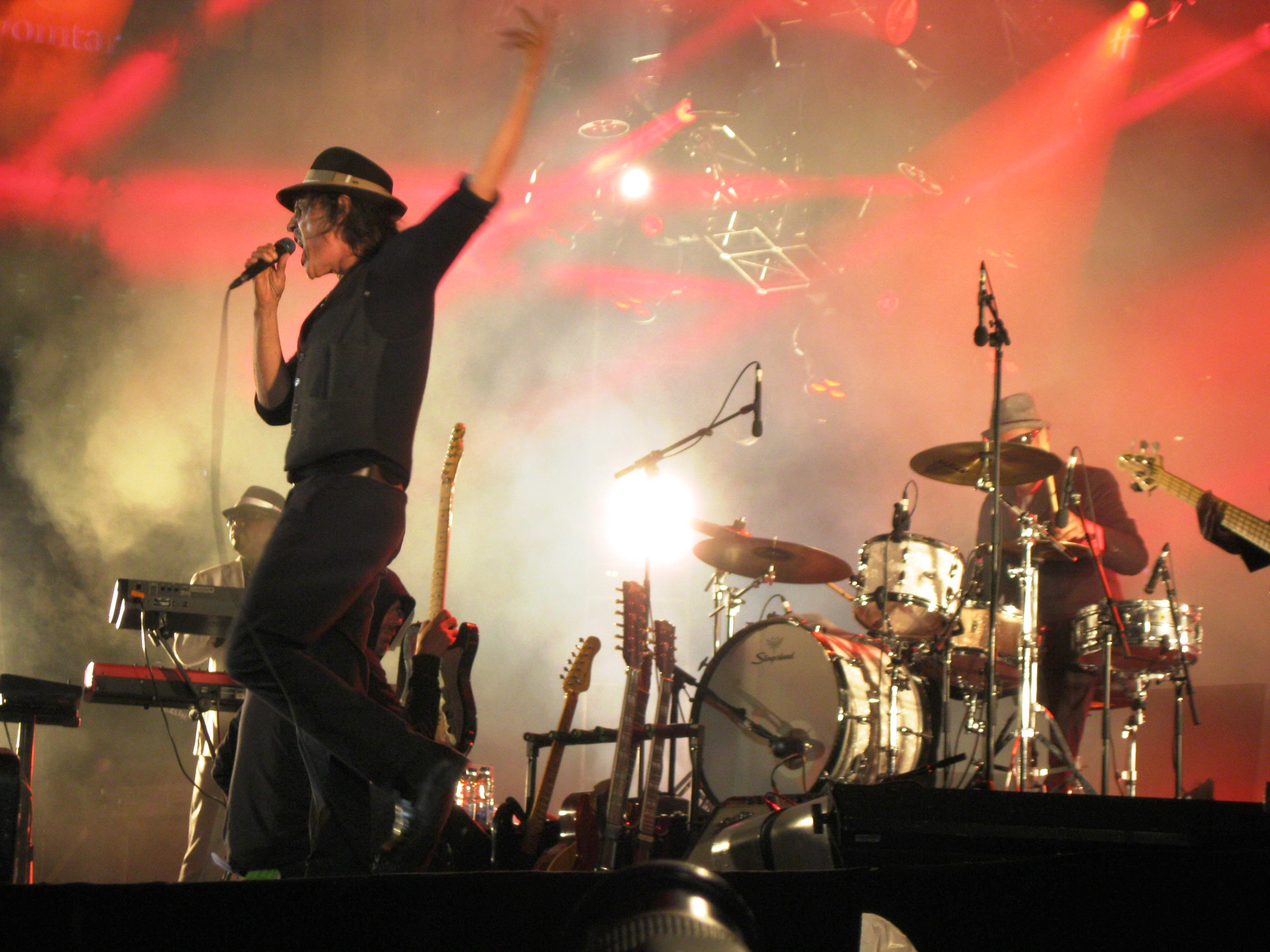 Jean Leloup a offert un spectacle gratuit à la Place des festivals le 26 juillet 2012 dans le cadre du festival Juste pour rire